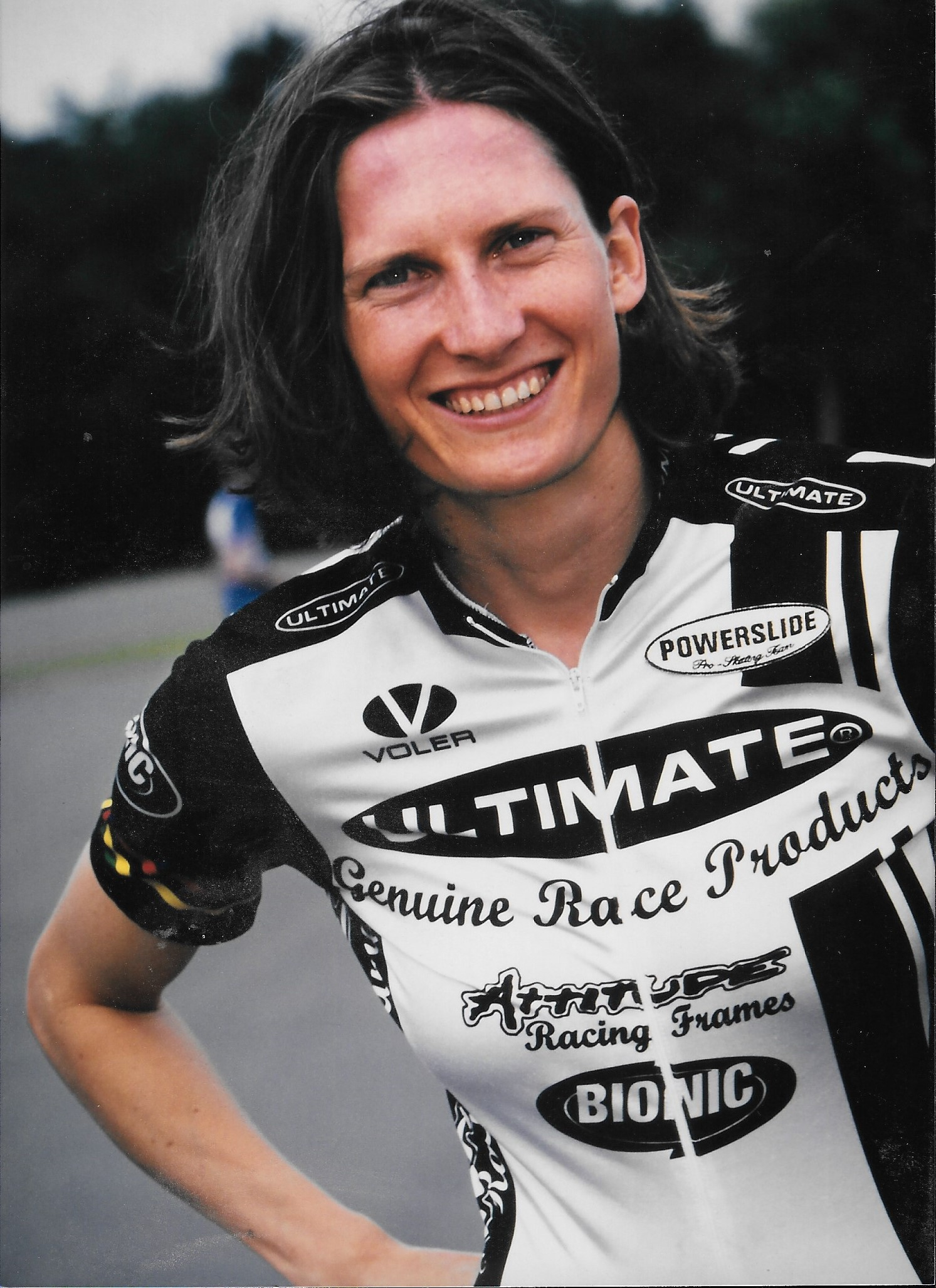 Anne Titze 1999